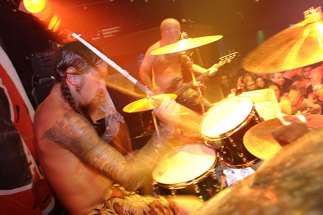 Fuente: ( Autor: Desconocido